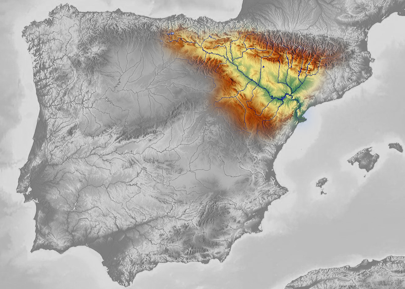 Map of Ebro river in Spain, Karte des hydrogeografischen Beckens des Ebro